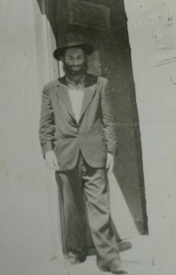 הרב שטיינמן בצעירותו בכפר סבא